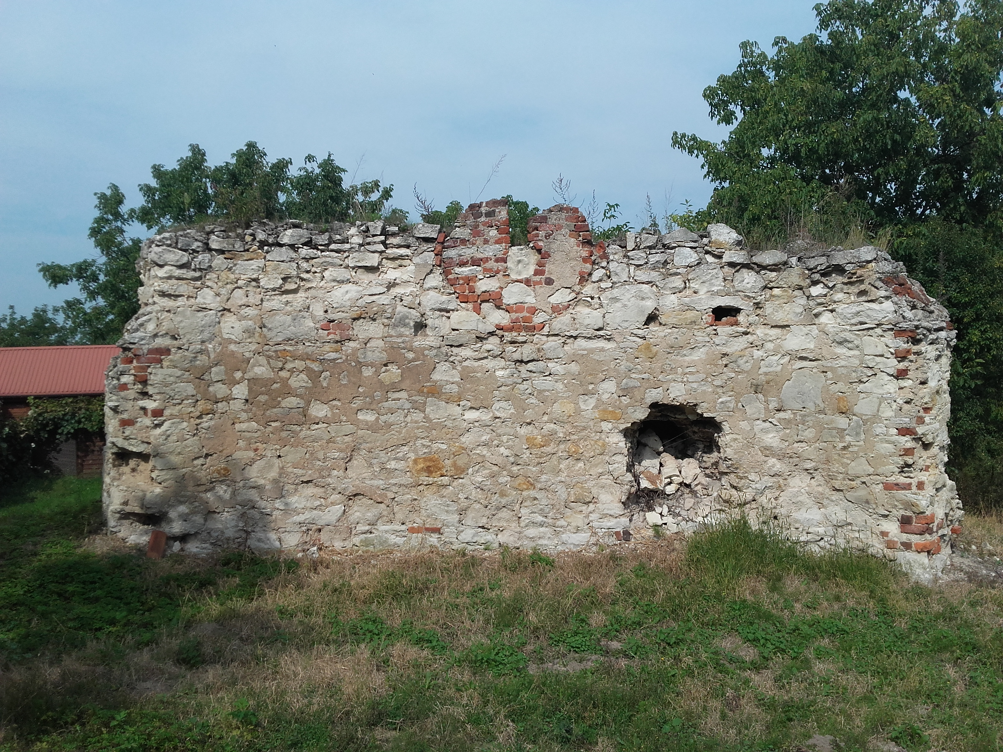 Bochotnica - pozostałości kaplicy grobowej – mauzoleum Jana Oleśnickiego vel Bochotnickiego, XVI (widok z boku)